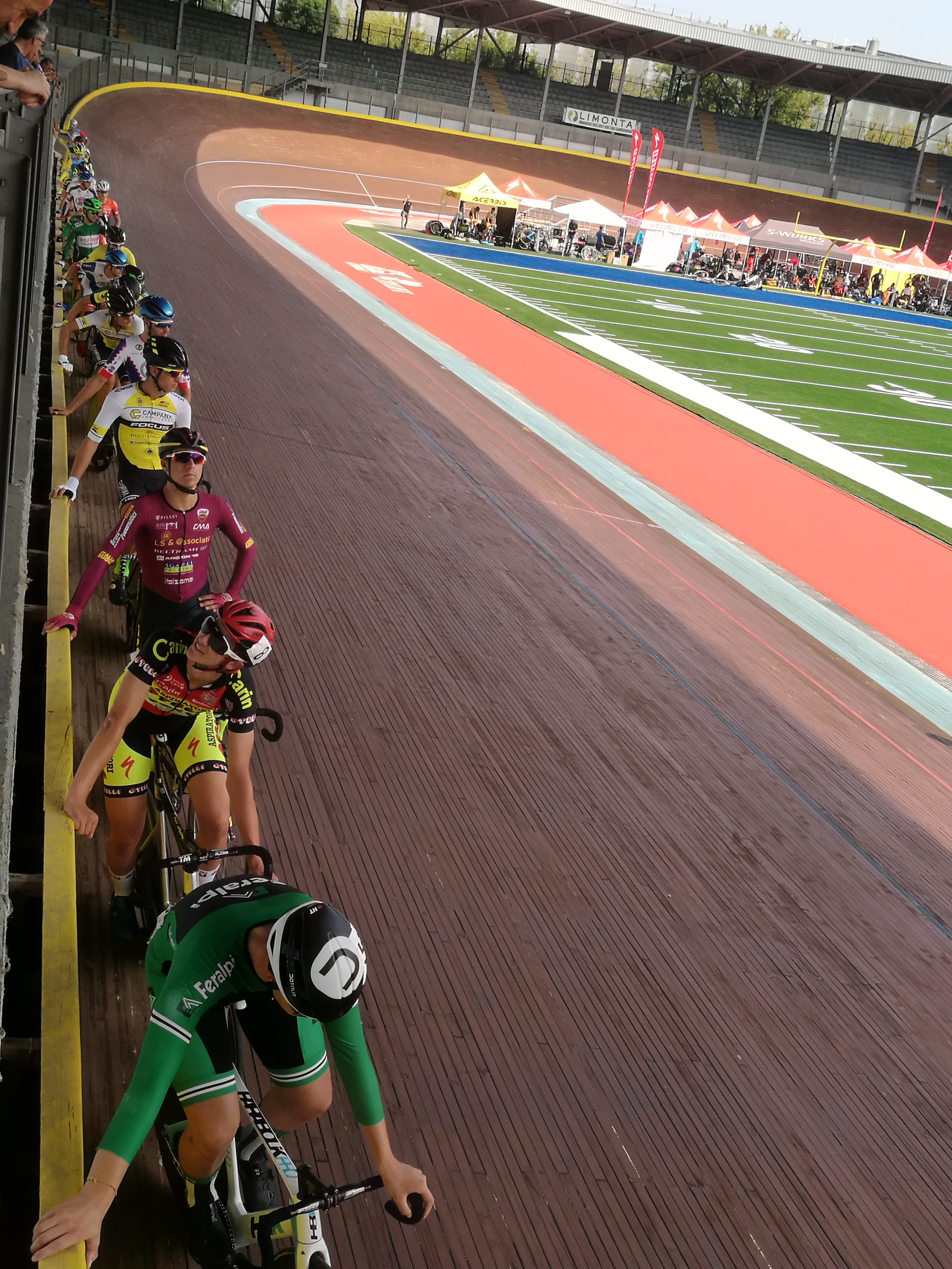 velodromo Maspes-Vigorelli This is a photo of a monument which is part of cultural heritage of Italy.